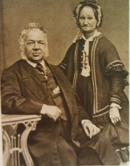 Семья Музиль Игнатий и Елена в 1876 году